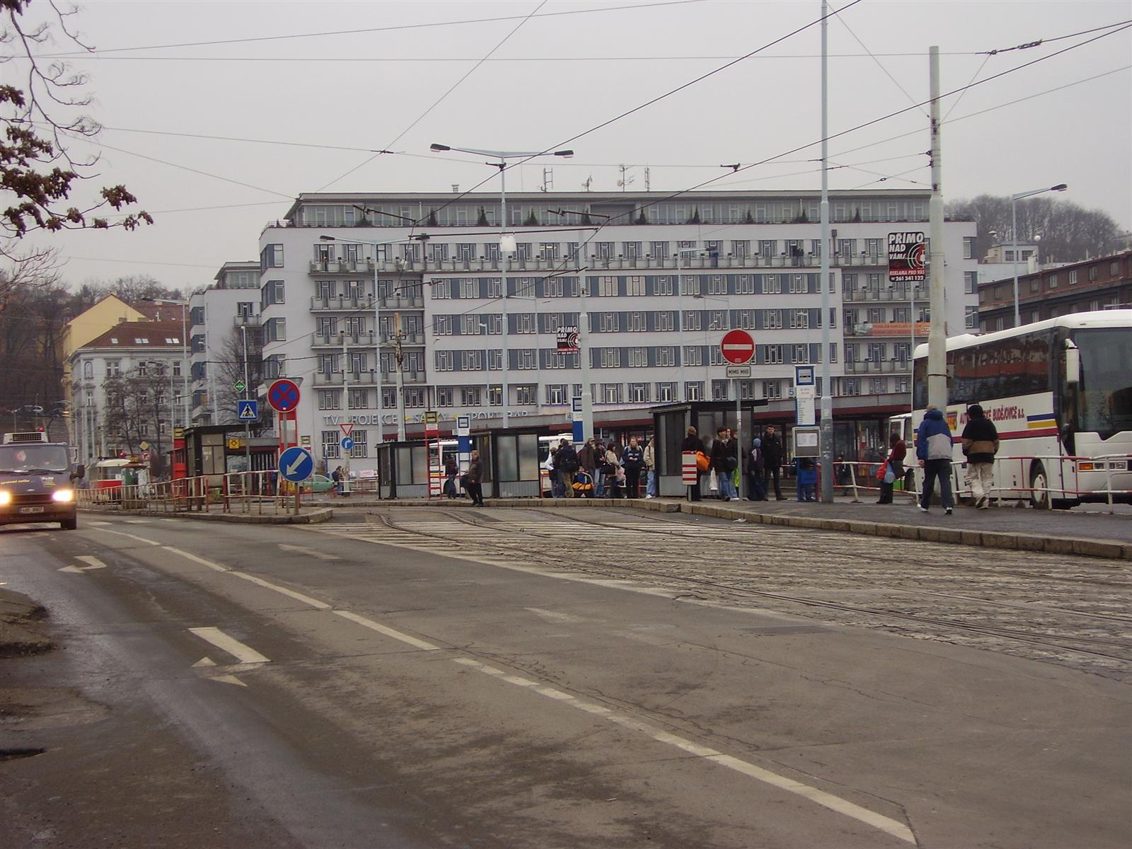 Ženské domovy v Praze, pohled přes AN Na Knížecí